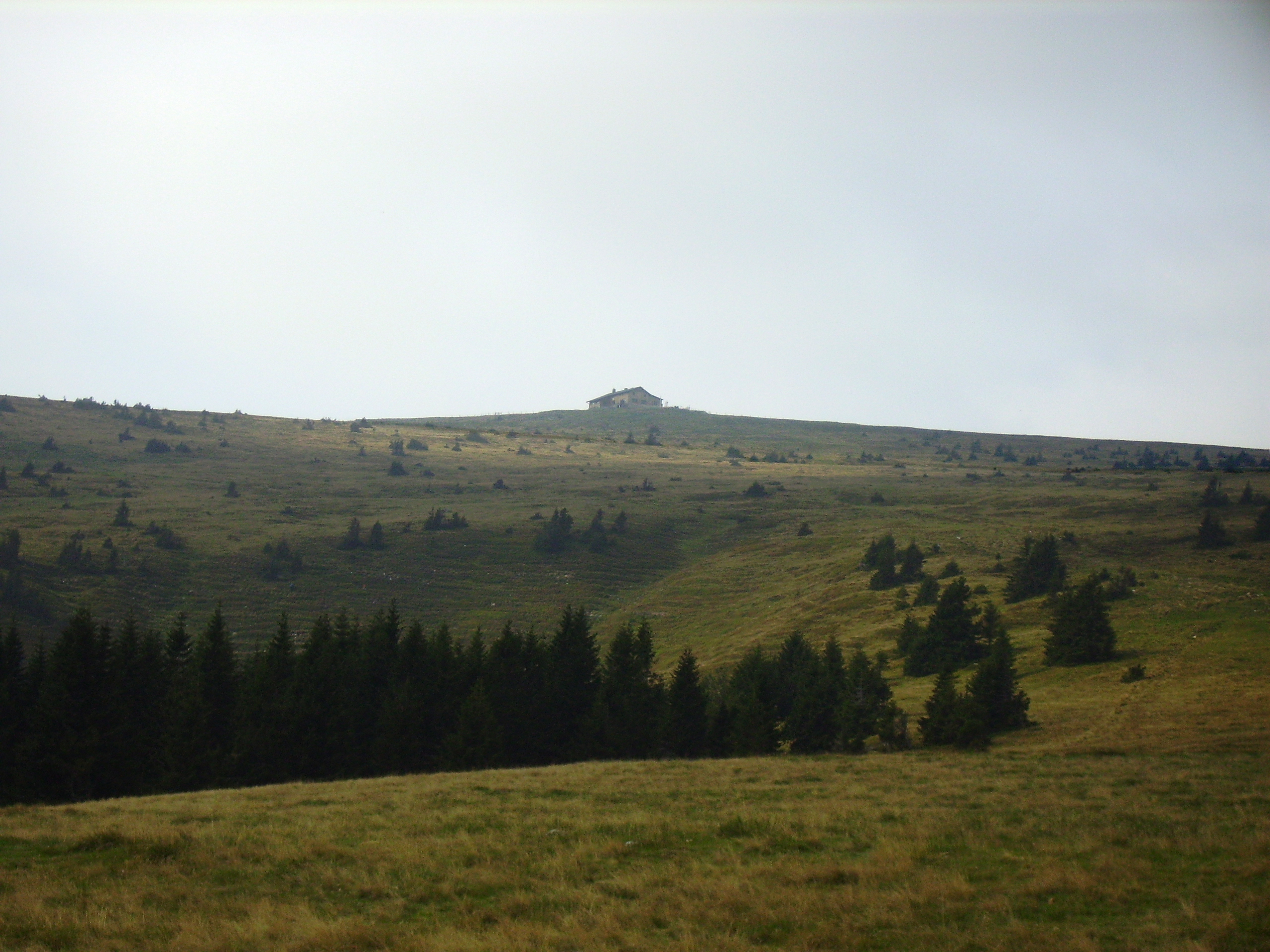 Wechsel, Berg in Österreich, Gipfel Hochwechsel mit Wetterkoglerhaus